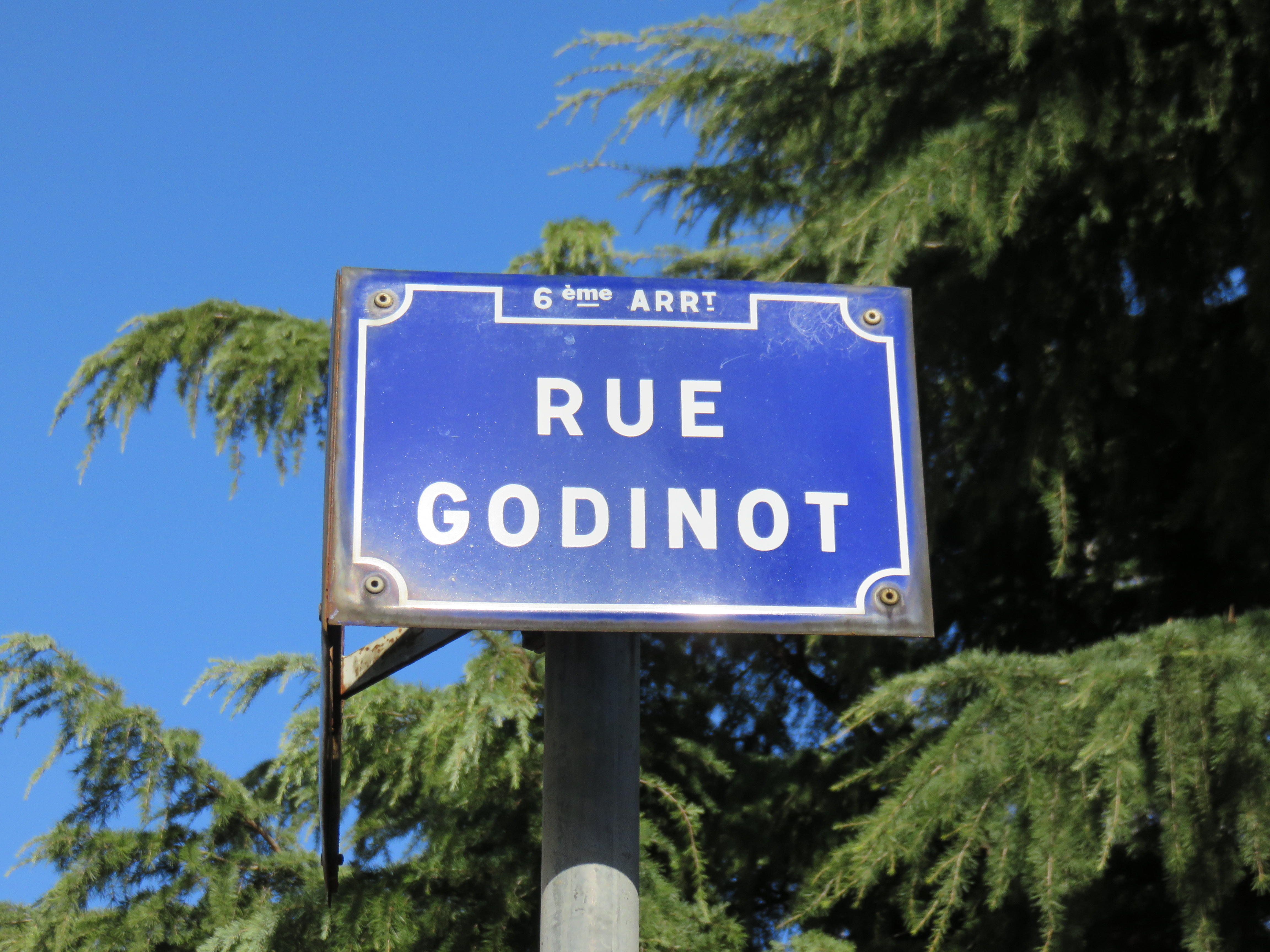 Plaque de la rue Godinot dans le 6e arrondissement de Lyon.